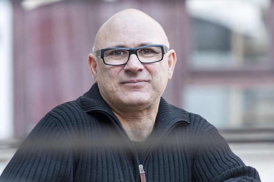 42è Joaquim Ruyra de narrativa juvenil_Santi Baró_L'Efecte Calders_Foto Òmnium Dani Codina_Baixa resolució 65a Nit de Santa Llúcia Tortosa ha acollit la nit de les #lletrescat de l'any 2015.